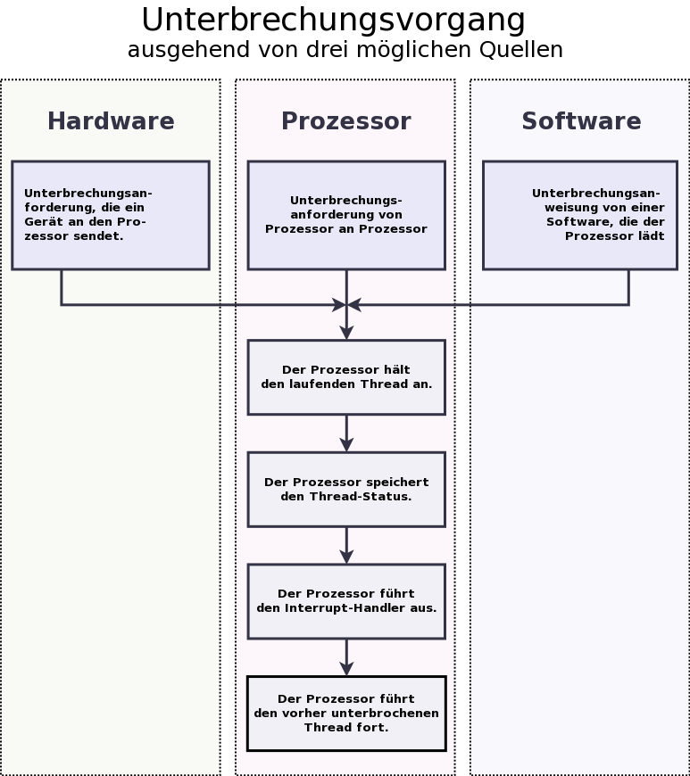 Schritte eines Interrupt-Prozesses.